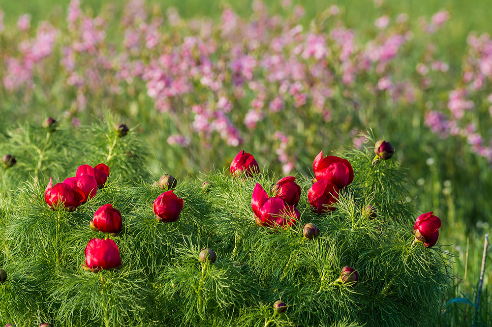 Хомуто́вський степ — відділ Українського державного степового заповідника